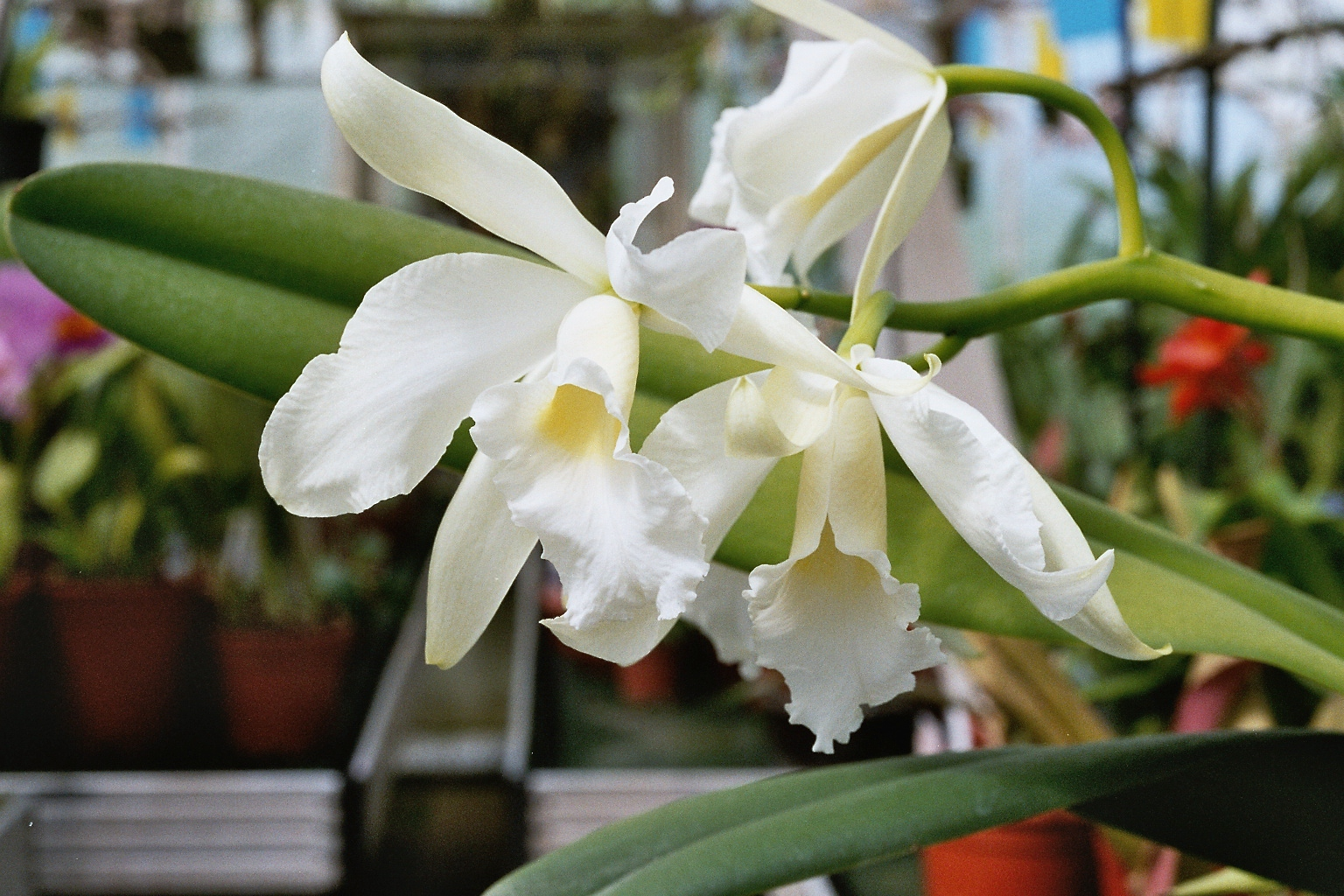 Laelia purpurata Elias